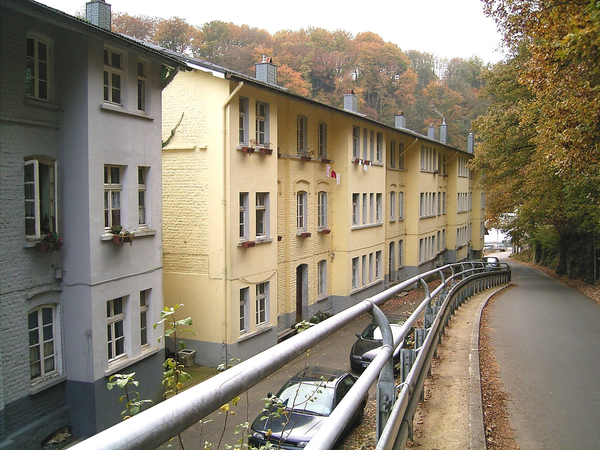 Radevormwald